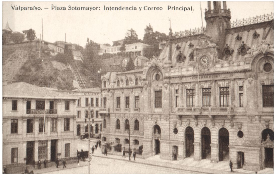 Antigua postal del Edificio de la Ex Intendencia de Valparaíso, actual Edificio Armada de Chile.